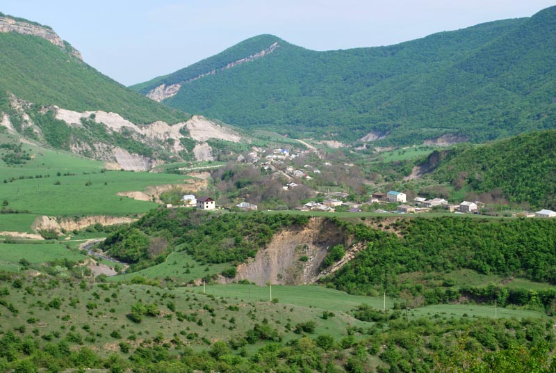 Вид села Цмур